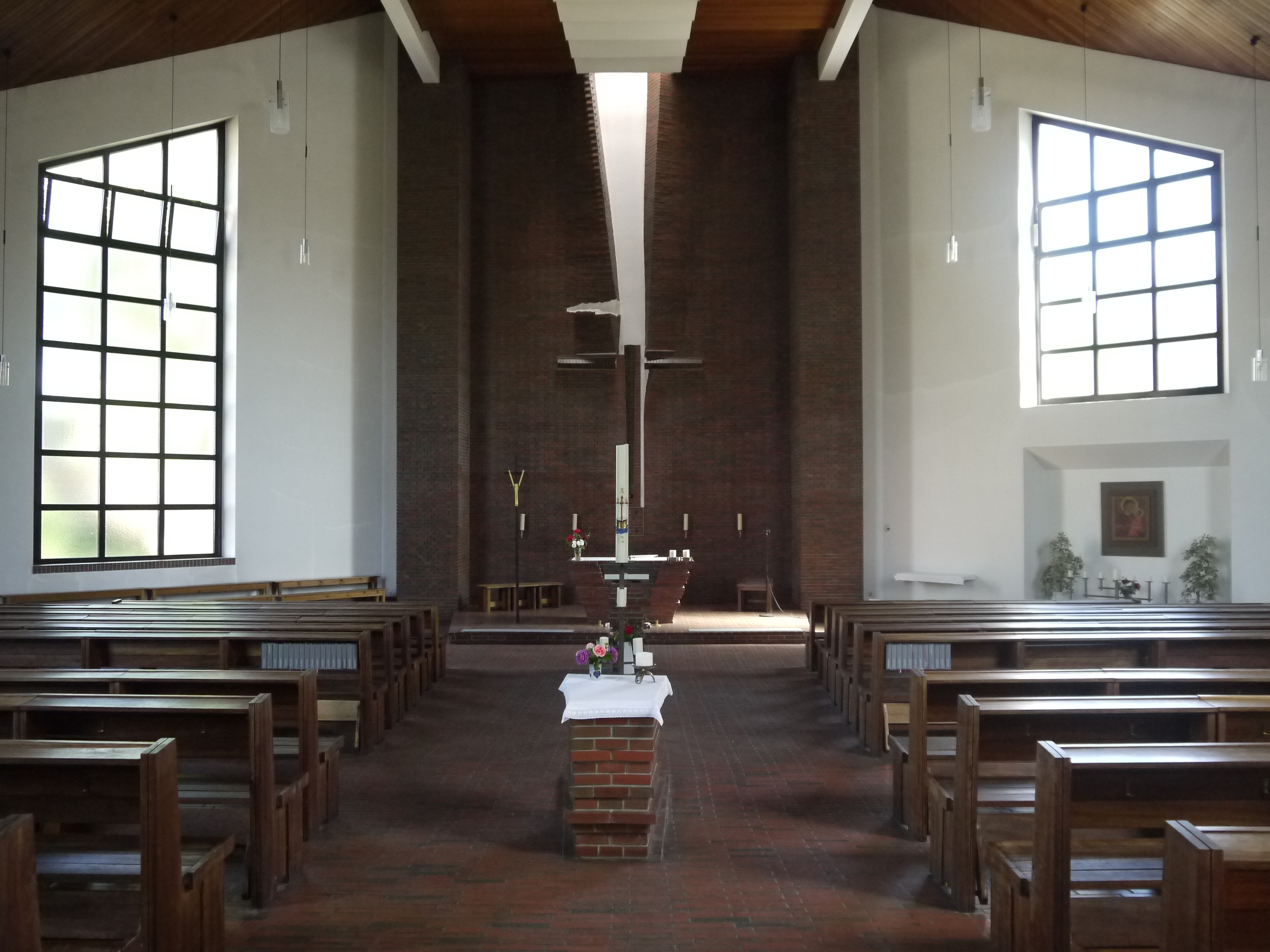 Der Altarraum der katholischen Heilig-Kreuz-Kirche in Berlin-Hohenschönhausen.